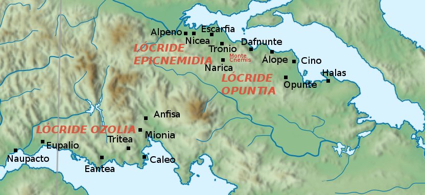 Mapa de algunas de las ciudades de la antigua Lócride.